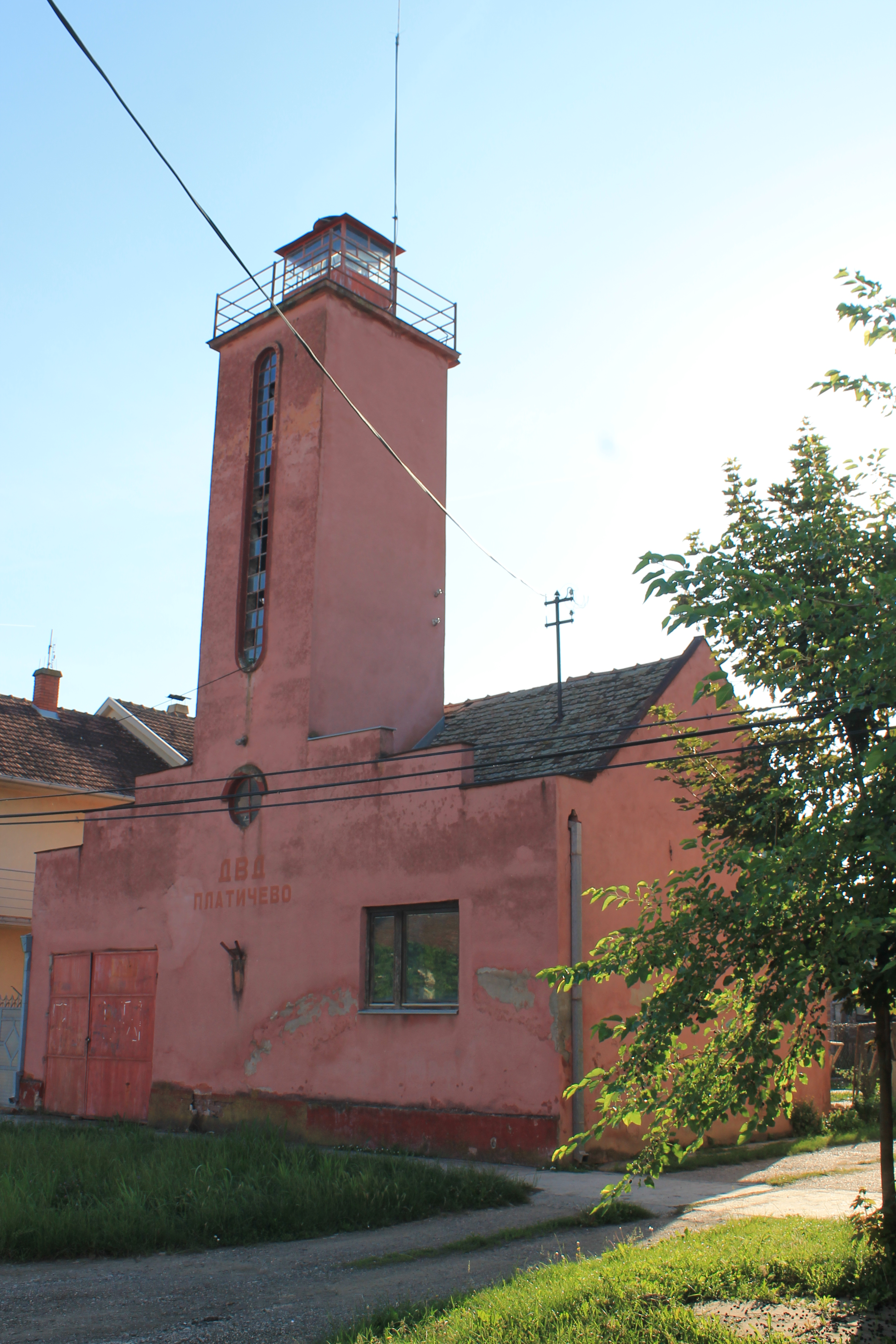 Platičevo